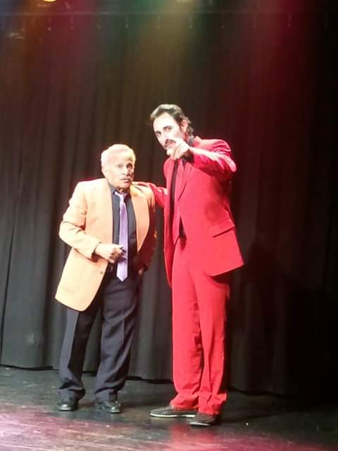 חנוך לוין בצבעים